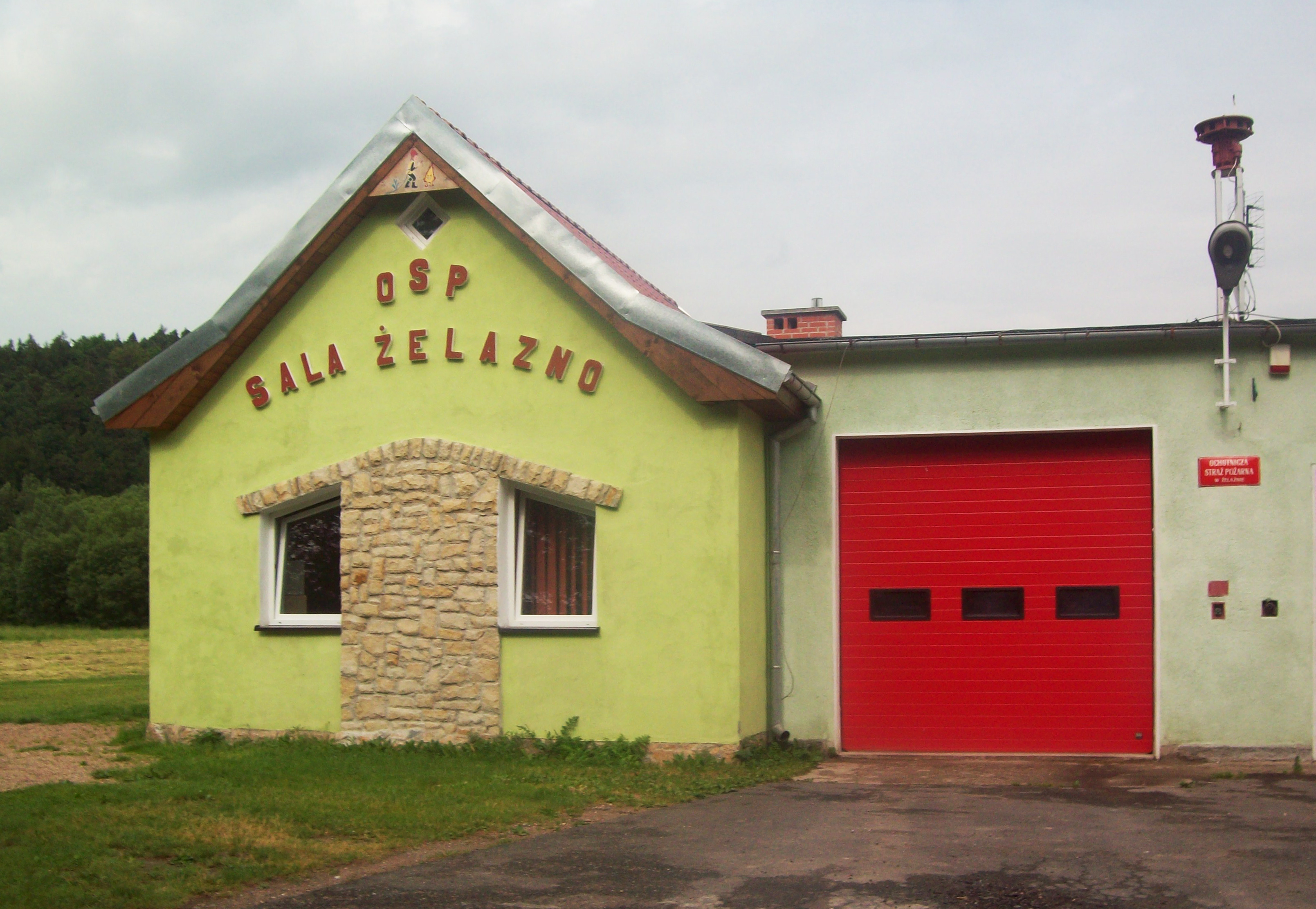 Ochotnicza Straż Pożarna w Żelaźnie